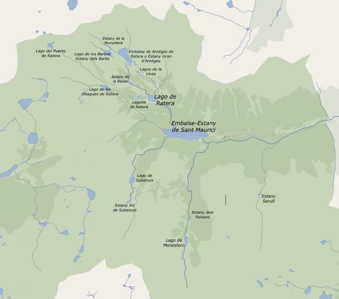 Mapa de los lagos de Espor a partir de Wikipedia maps beta